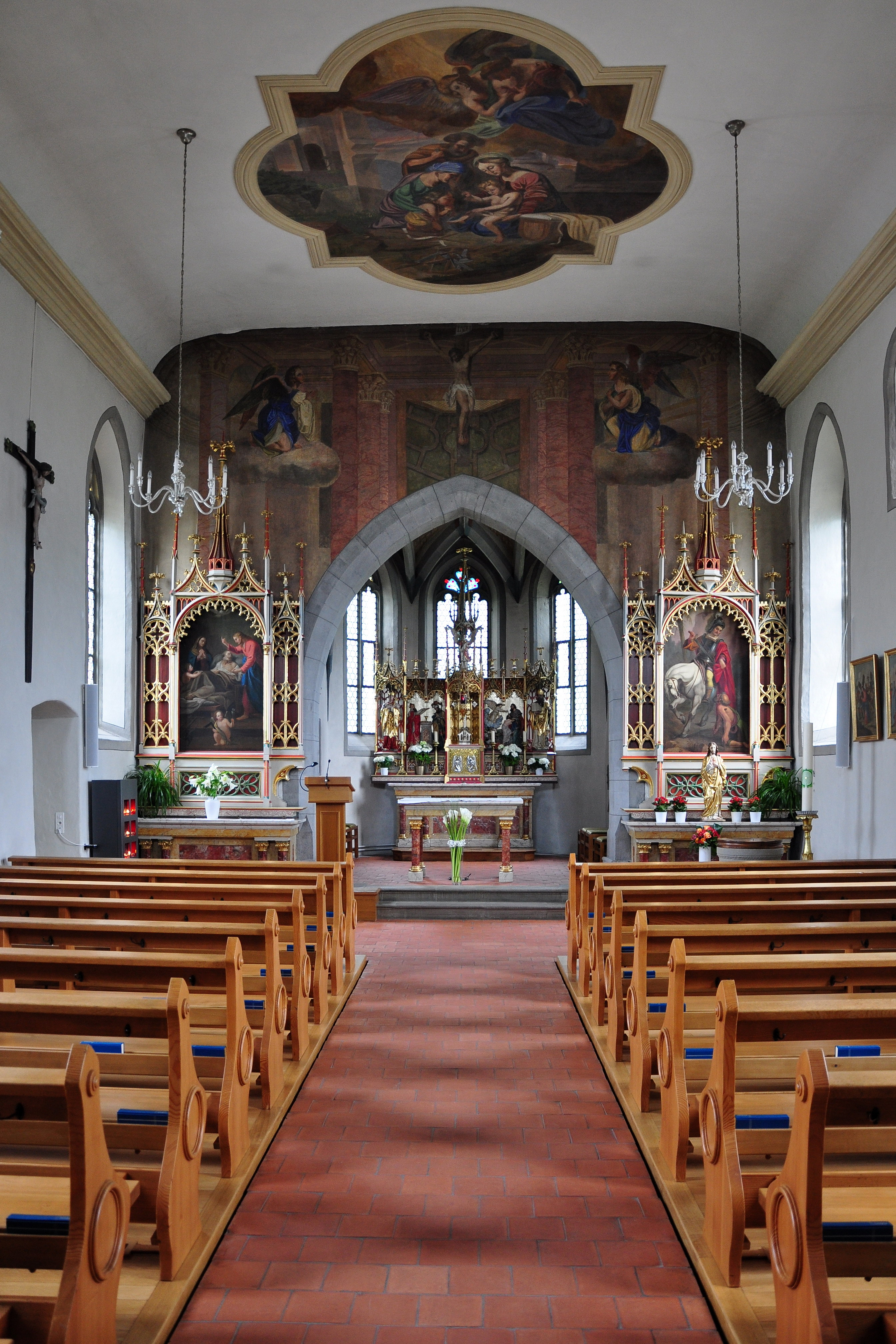 St. Martin Busskirch in Jona (SG) on upper Lake Zürich shore